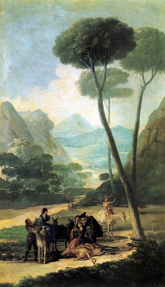 La caída. Madrid, colección particular.